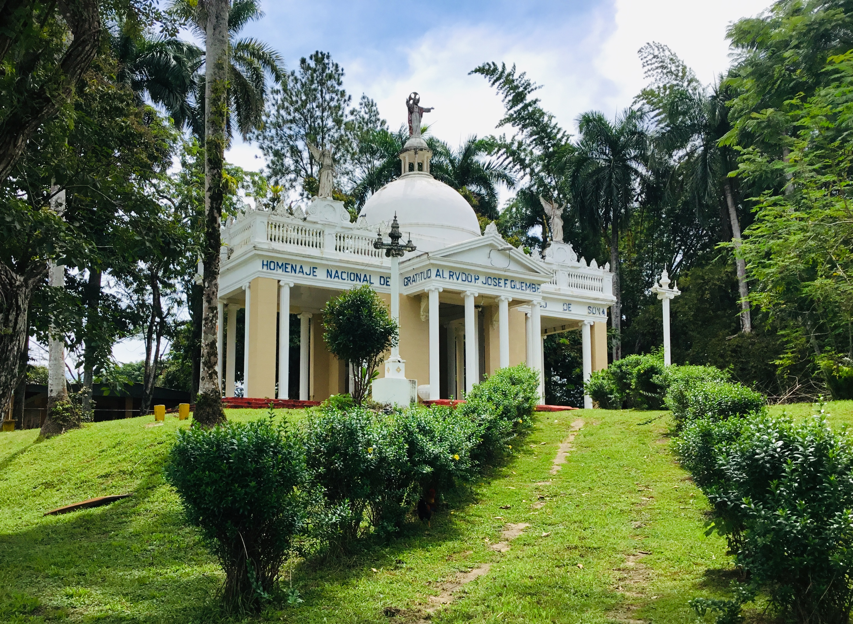 Mausoleo dedicado al sacerdote español José Félix Guembe en donde residen sus restos, en Soná, Provincia de Veraguas.